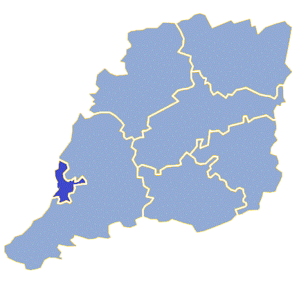 Powiat krośnieński (województwo lubuskie) - Gmina Miejska Gubin